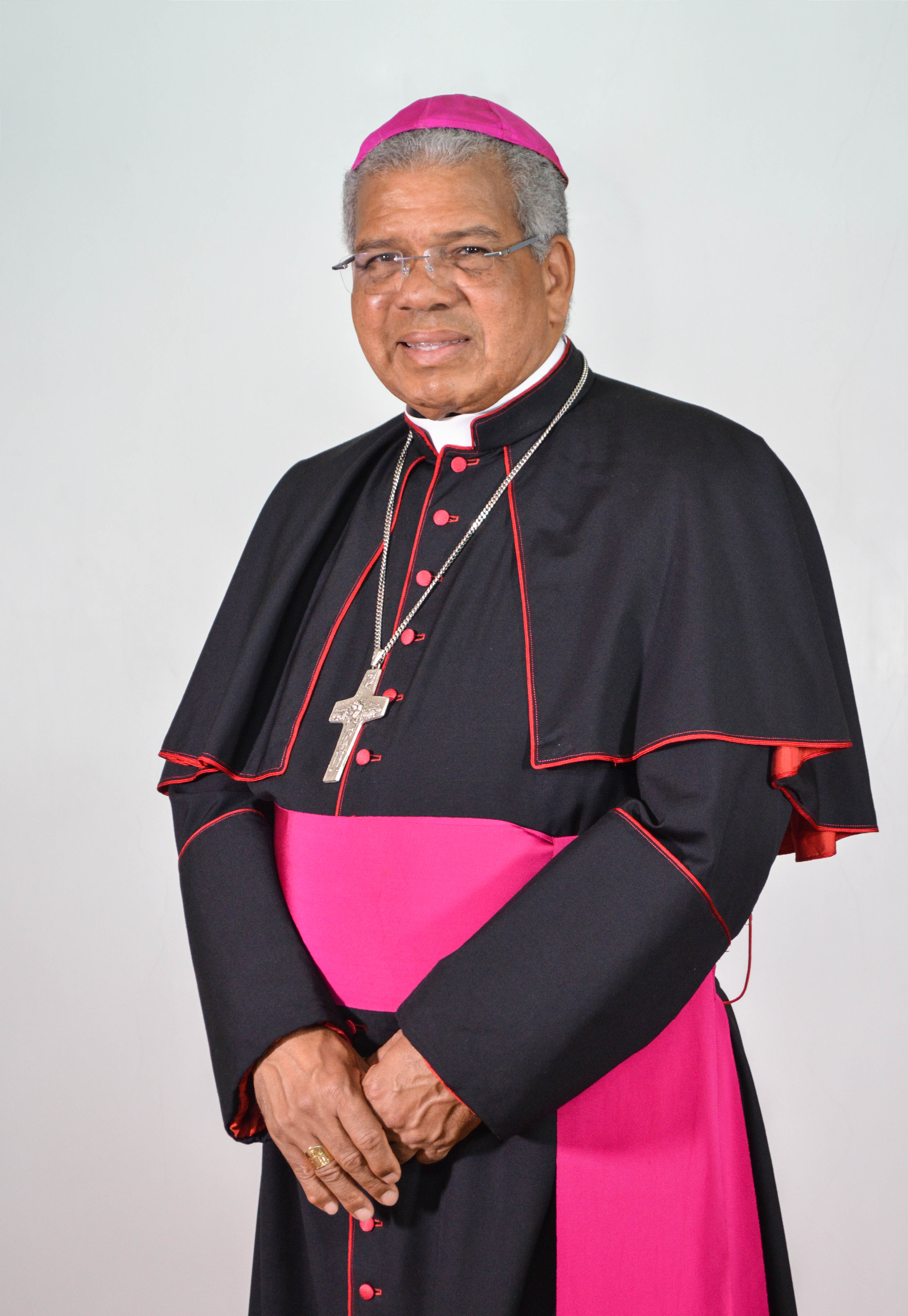 Foto 2018. Arzobispo Metropolitano de Santo Domingo. Primado de América.